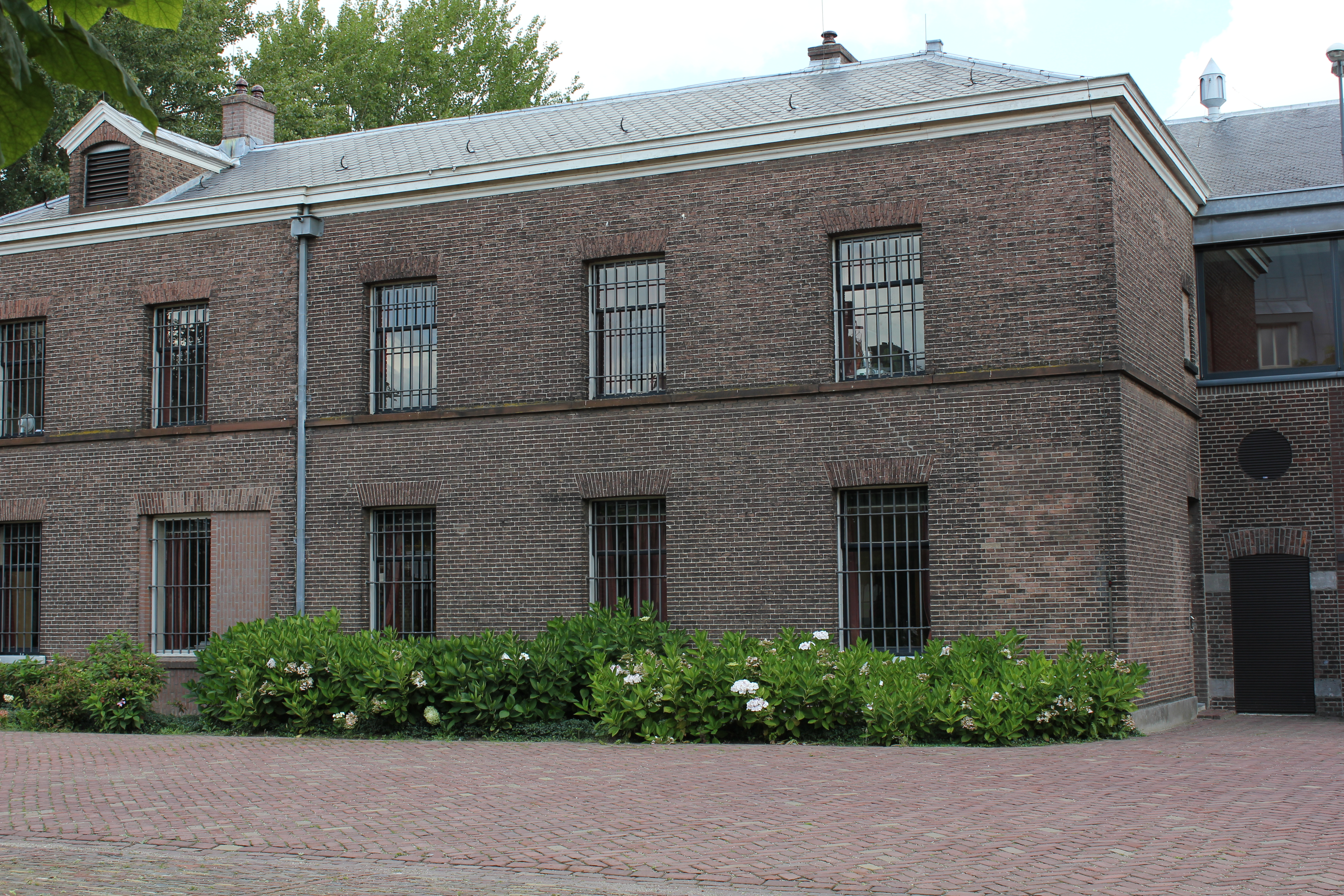 Rijksmonument in Utrecht